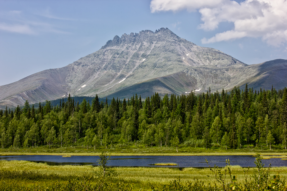 Гора Манарага. Югыд ва, национальный парк: Парк расположен на востоке Республики Коми, на территории Вуктыльского (47,6% общей площади), Печорского (22,4%) и Интинского (30%) административных районов. На юге парк граничит с Печоро-Илычским государственным природным заповедником, Вуктыл, Вуктыльский район, республика Коми This image is related to the protected area of Russia number 1100067